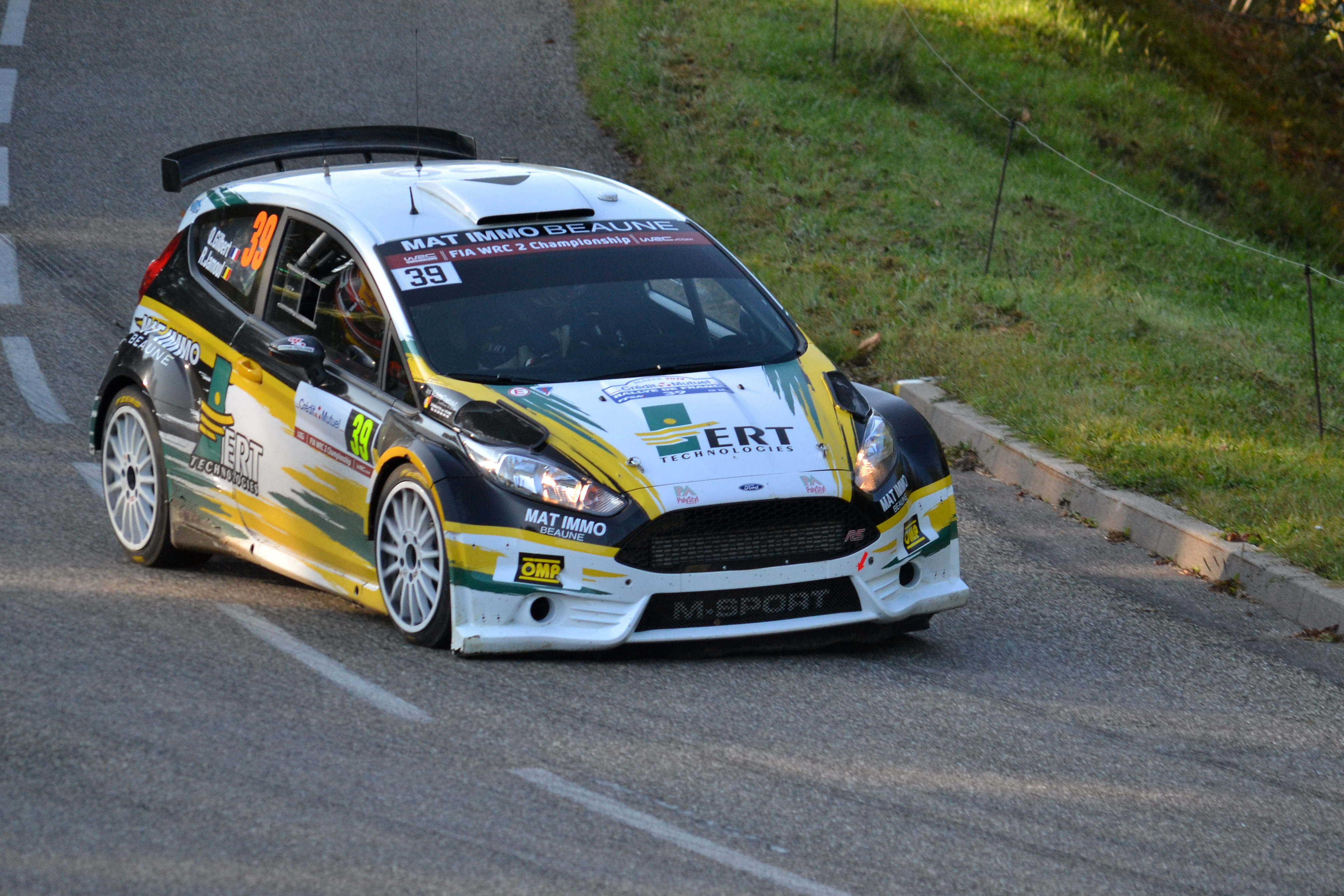 Rallye WRC France-Alsace 2014, ES9 Soultzeren - Le Grand Hohnack 1 à Labaroche. Ford Fiesta R5 - Quentin Gilbert - Renaud Jamoul